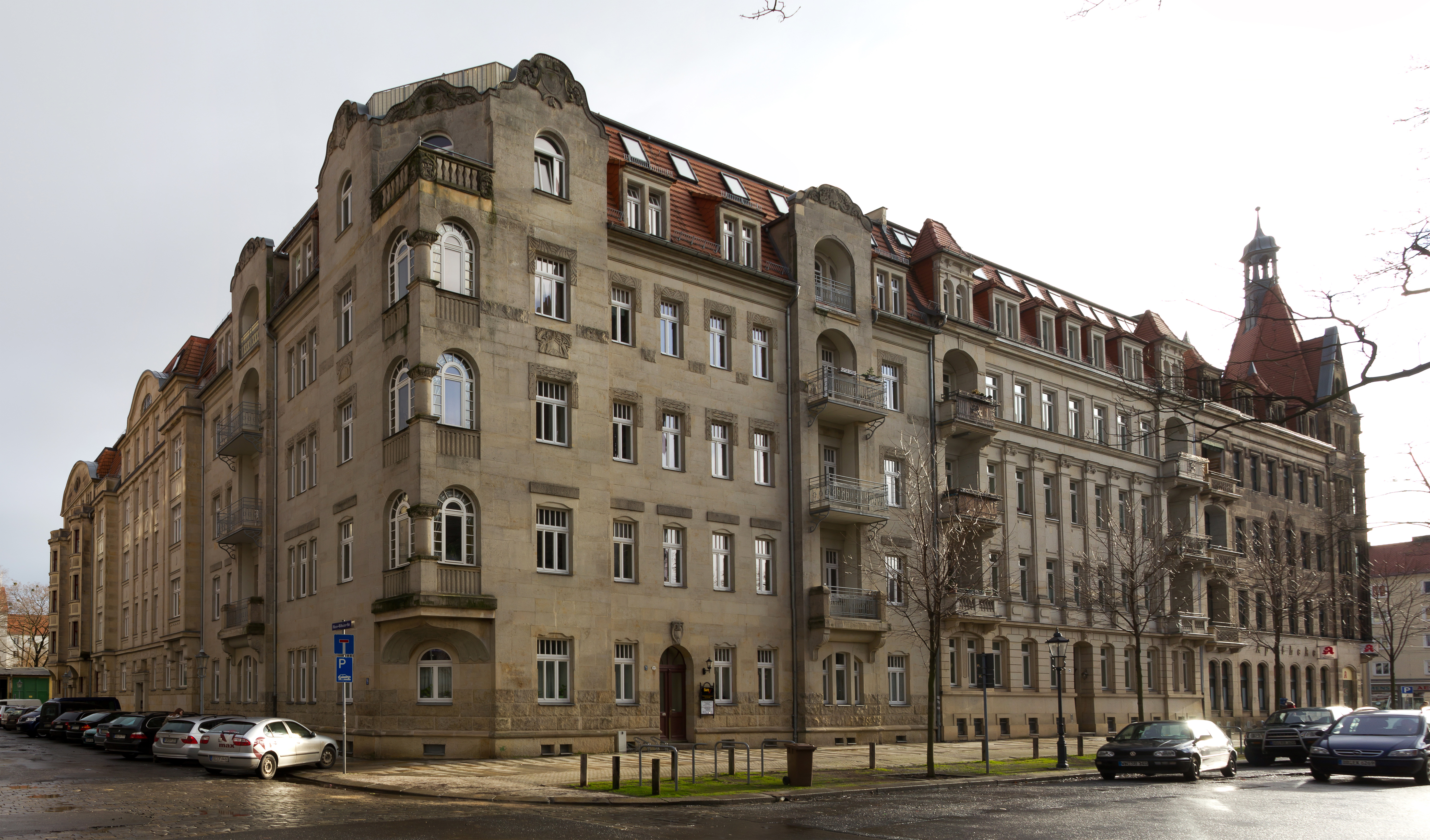 Krenkelstraße 22 in Dresden rechts davon die Krenkelstraße 20, links die Hans-Böheim-Straße 2-4